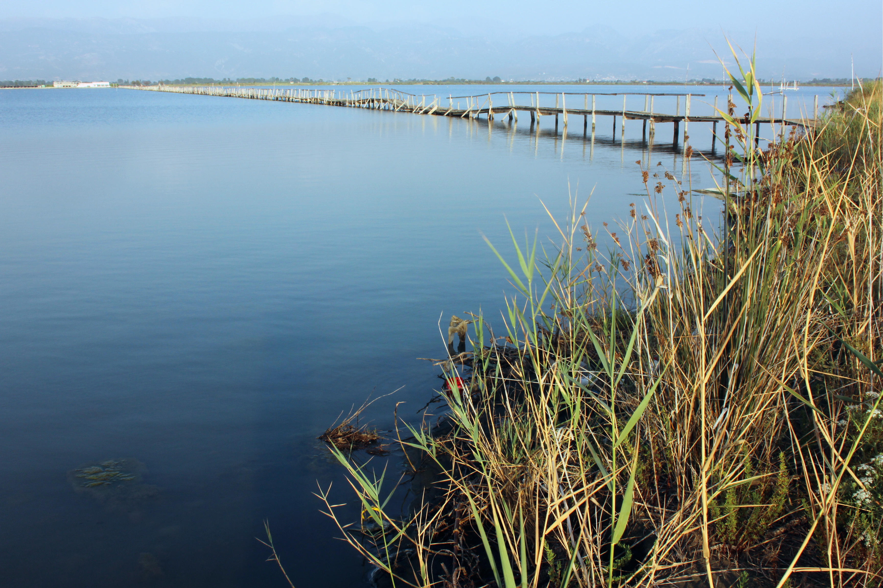 Fußgängerbrücke von Patok in Albanien. Etwa 900 Meter lang.